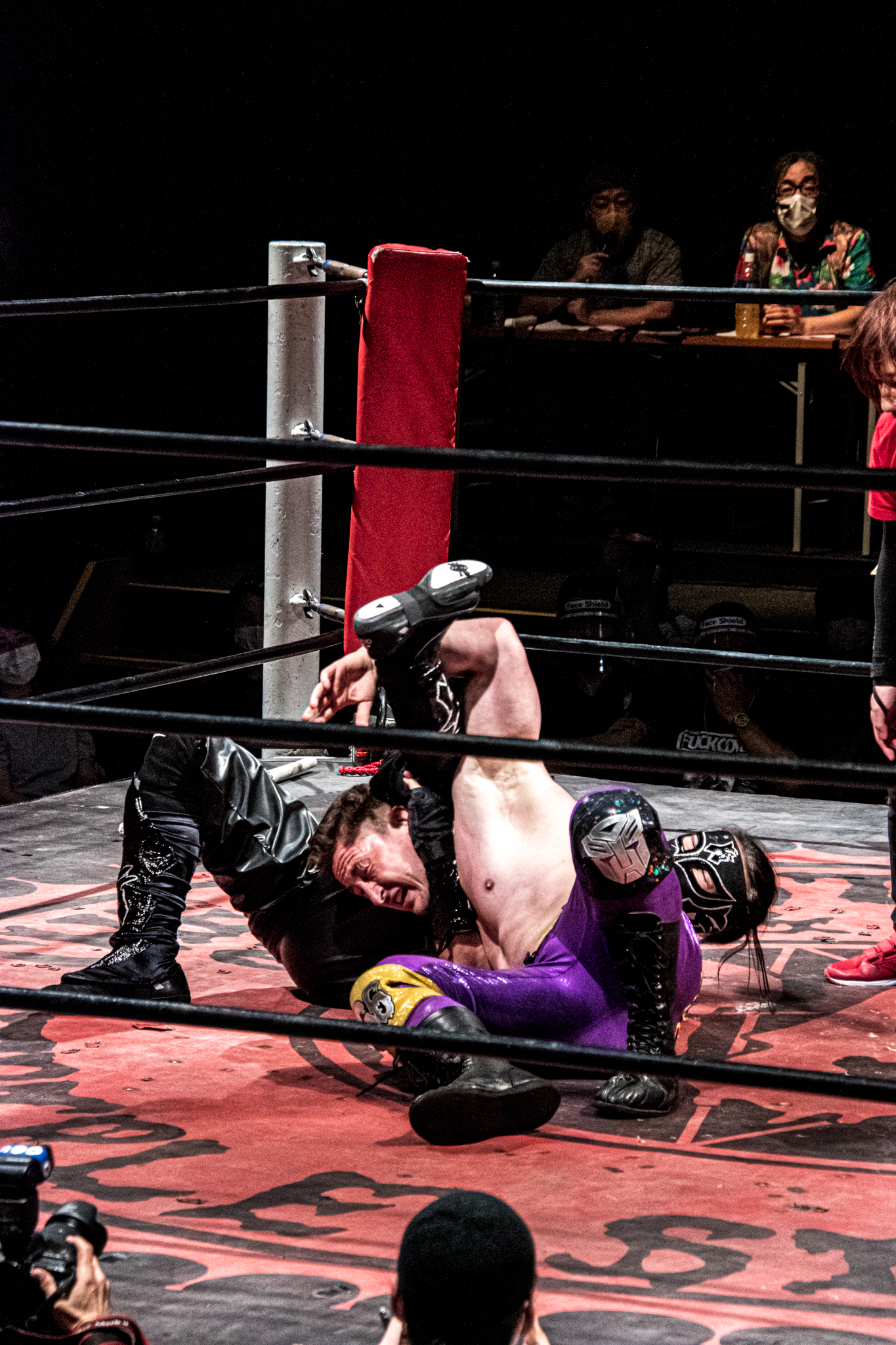 プロレスラーK666の得意技シックスクラッチ